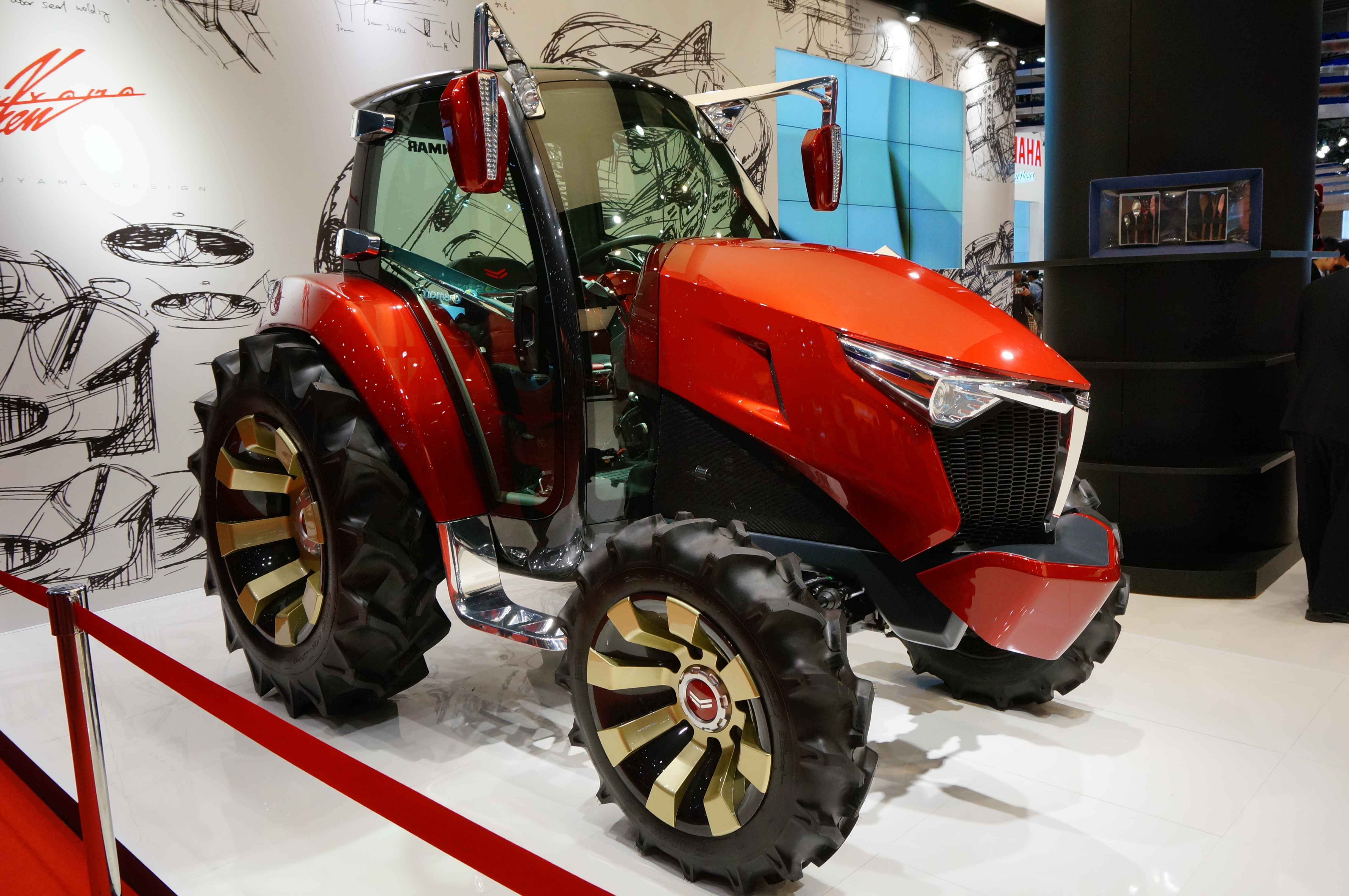 東京モーターショー2013にて作者自身が撮影。